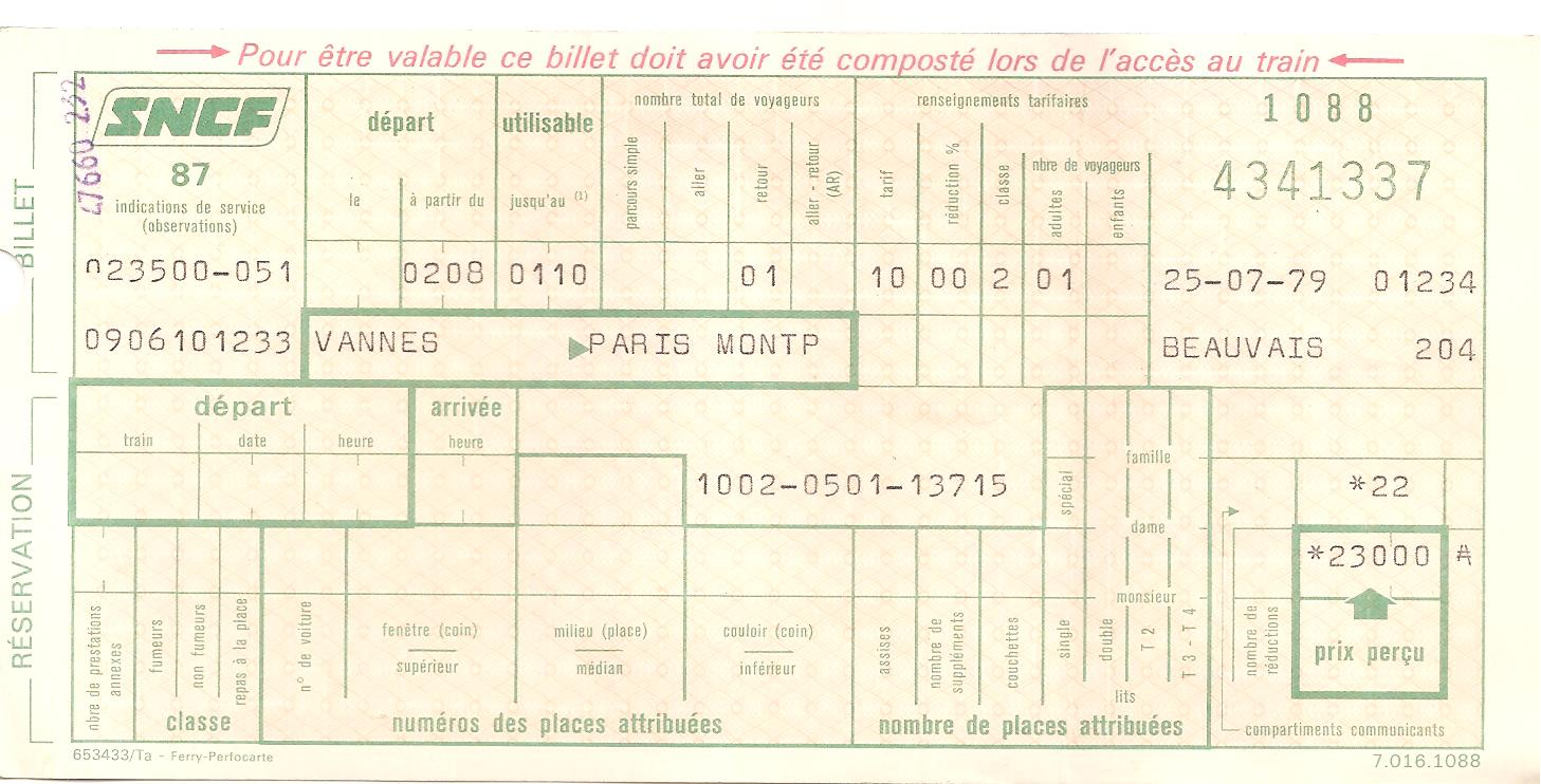 Billet SNCF informatisé, première génération d'informatisation, Vannes-Paris le 2 aout 1979, émis à Beauvais le 25 juillet 1979